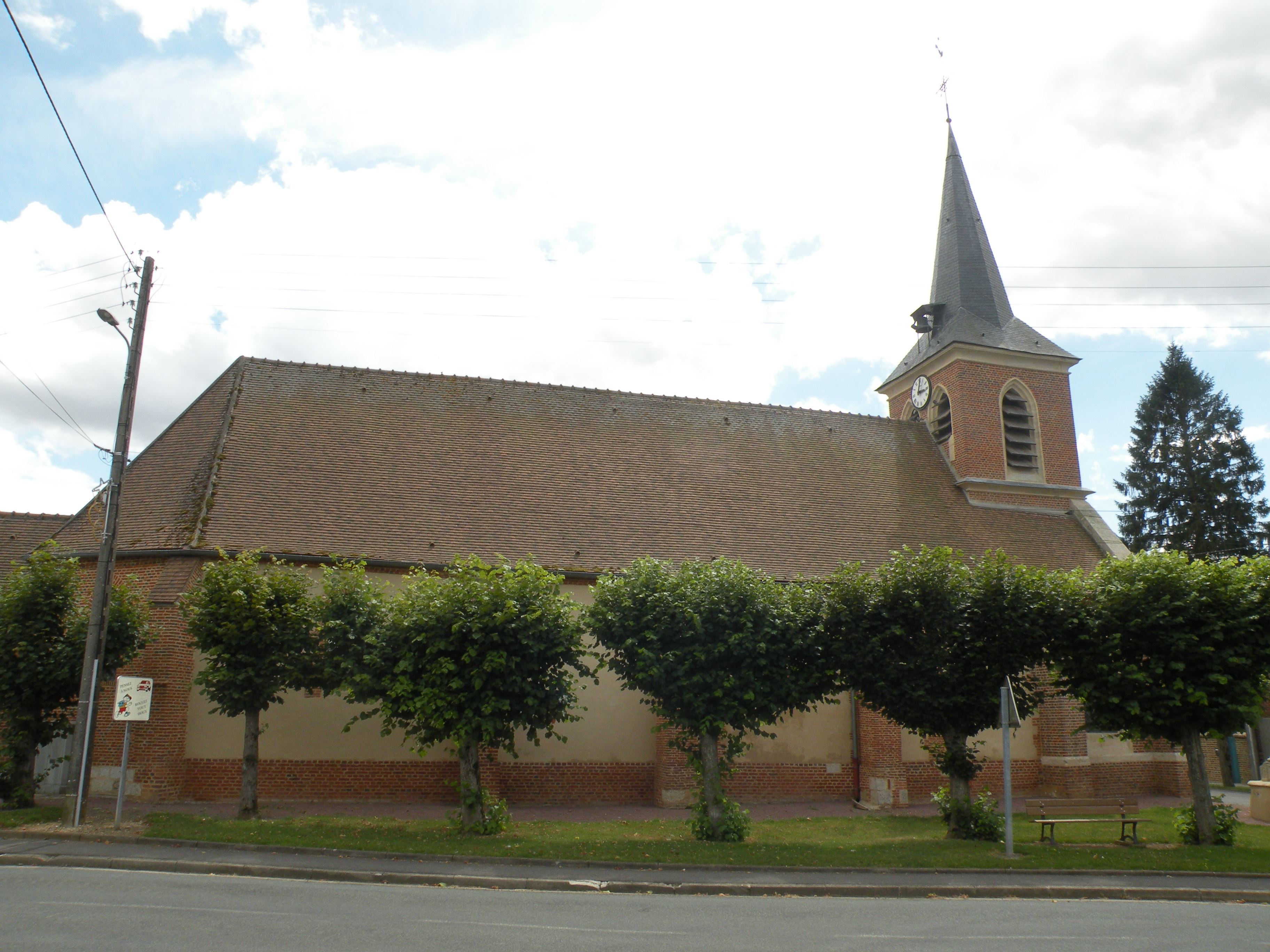 église Le Déluge (Oise)